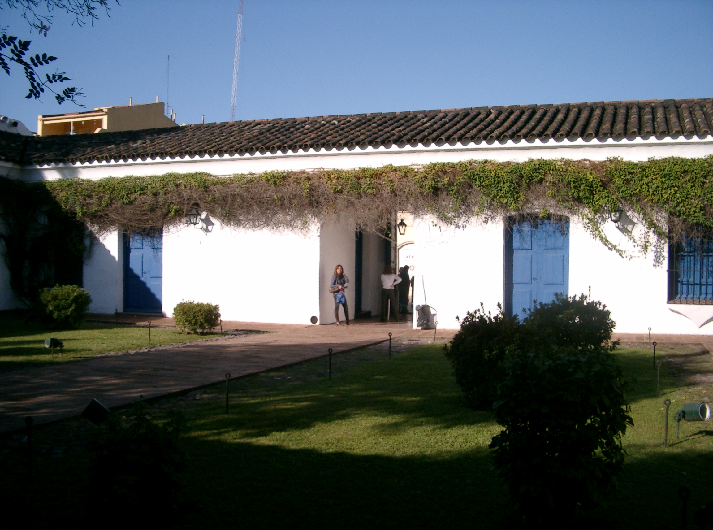 patio de la casa de tucuman